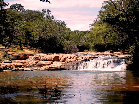 Rio Riachão Mirabela/MG